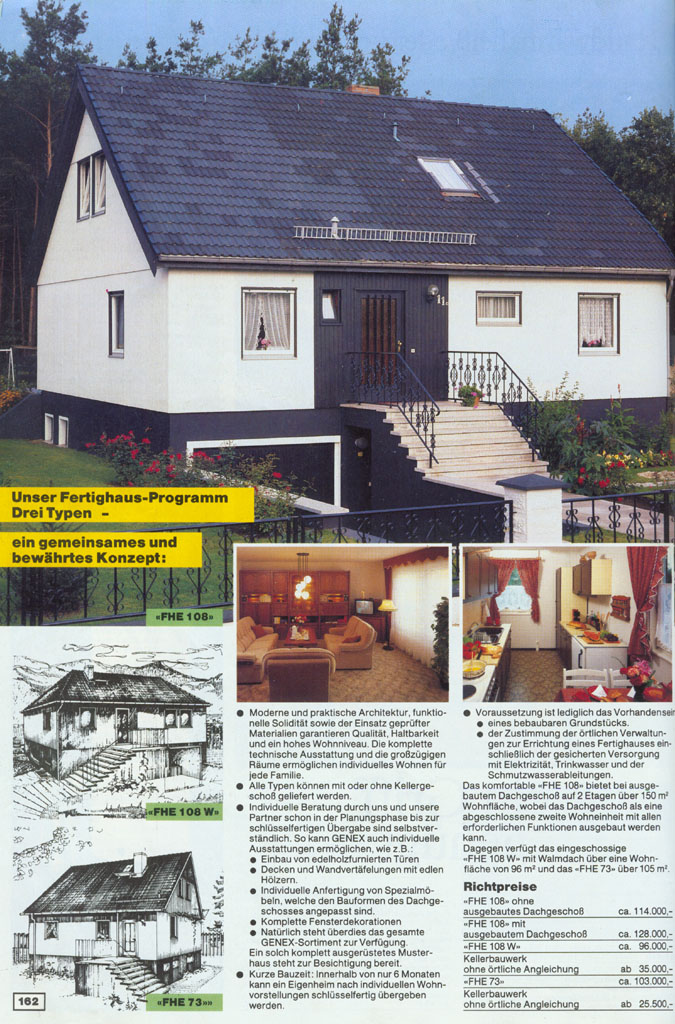 Foto aus dem Katalog der Genex.